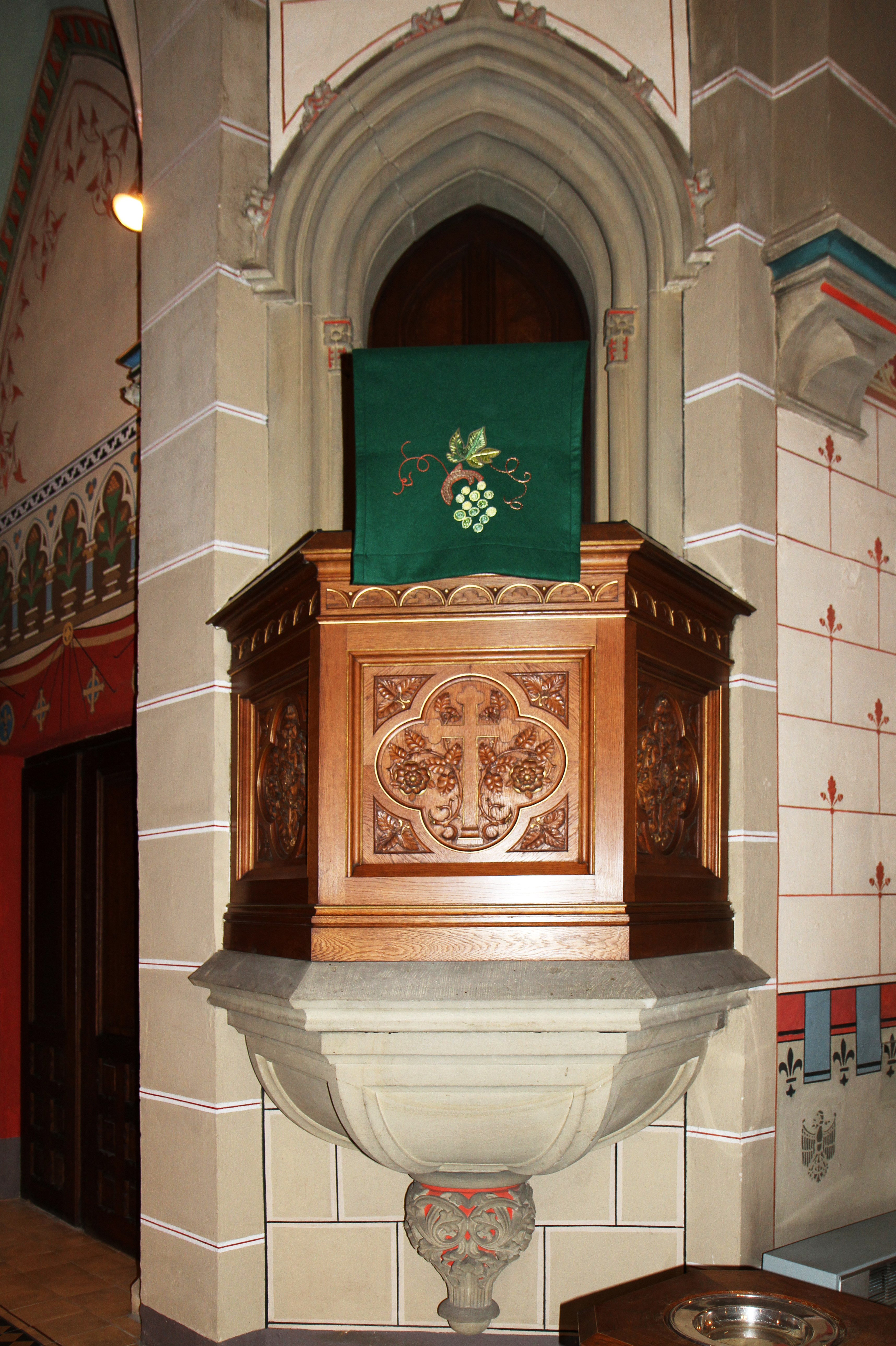 Evangelische Kirche Oberwesel, Chablis-Straße. Die Kirche ist ein neugotischer Backsteinbau, der nach Plänen des Architekten August Heinz aus Boppard zwischen 1897 und 1899 erbaut wurde.